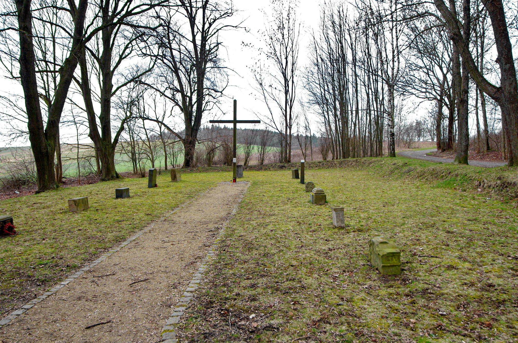 Horní Pelhřimov, přenesené náhrobky z hřbitova bývalého kostela Svaté Anny, okres Cheb